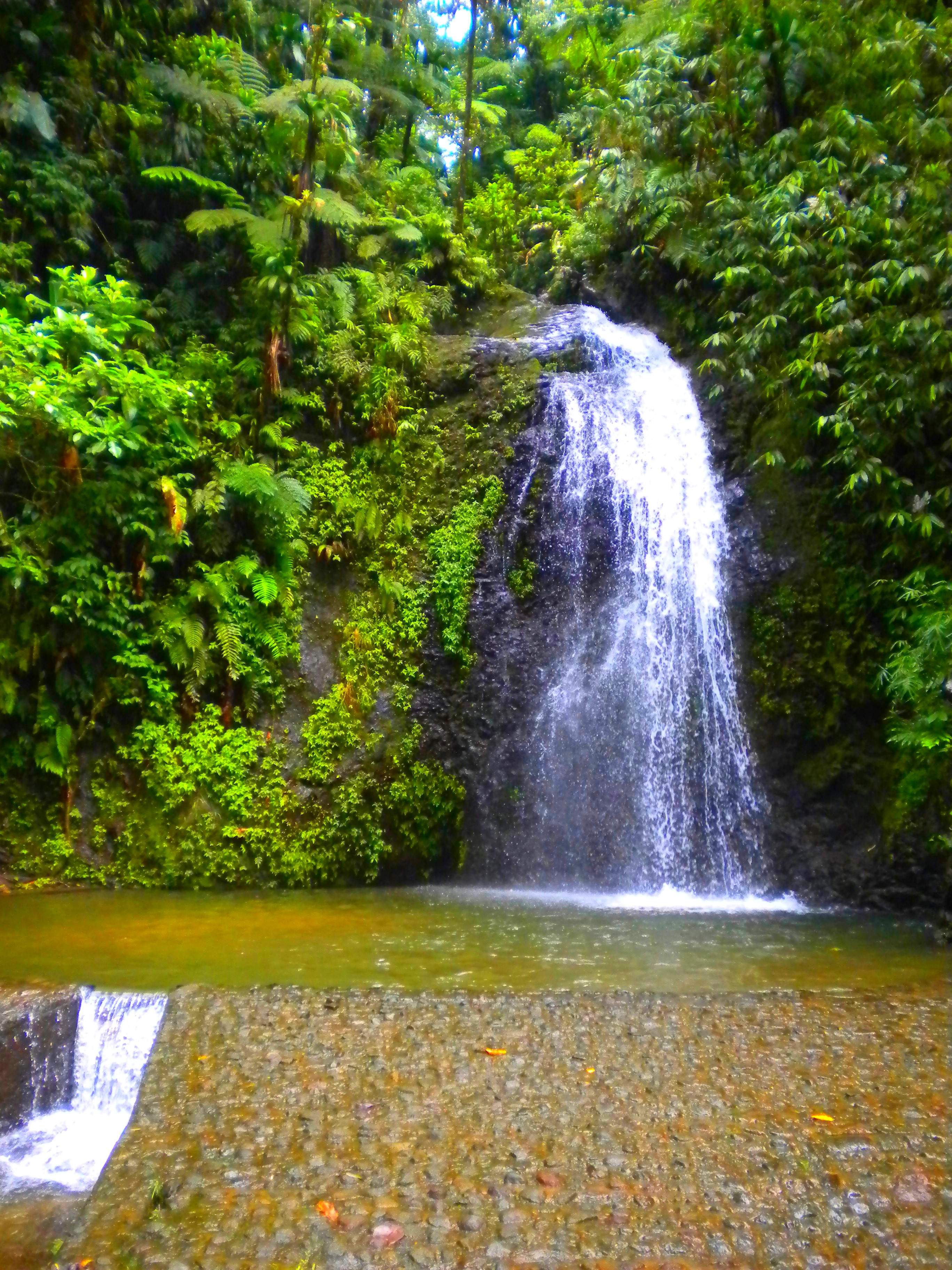 Cascade de Saut-Gendarme Fonds Saint Denis, Fort-de-France, Martinique